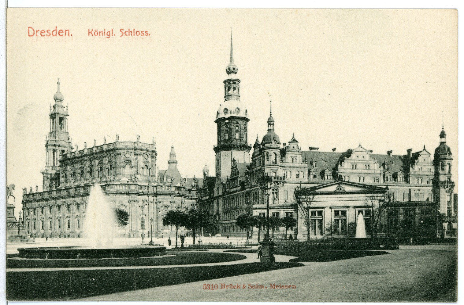 Dresden; Königliches Schloß und Hofkirche This postcard is from publisher Brück & Sohn in Meißen ( This postcard has a unique number 05310 and is available in a higher resolution at the publisher. This images was uploaded in a cooperation project between Wikipedians and the publisher.